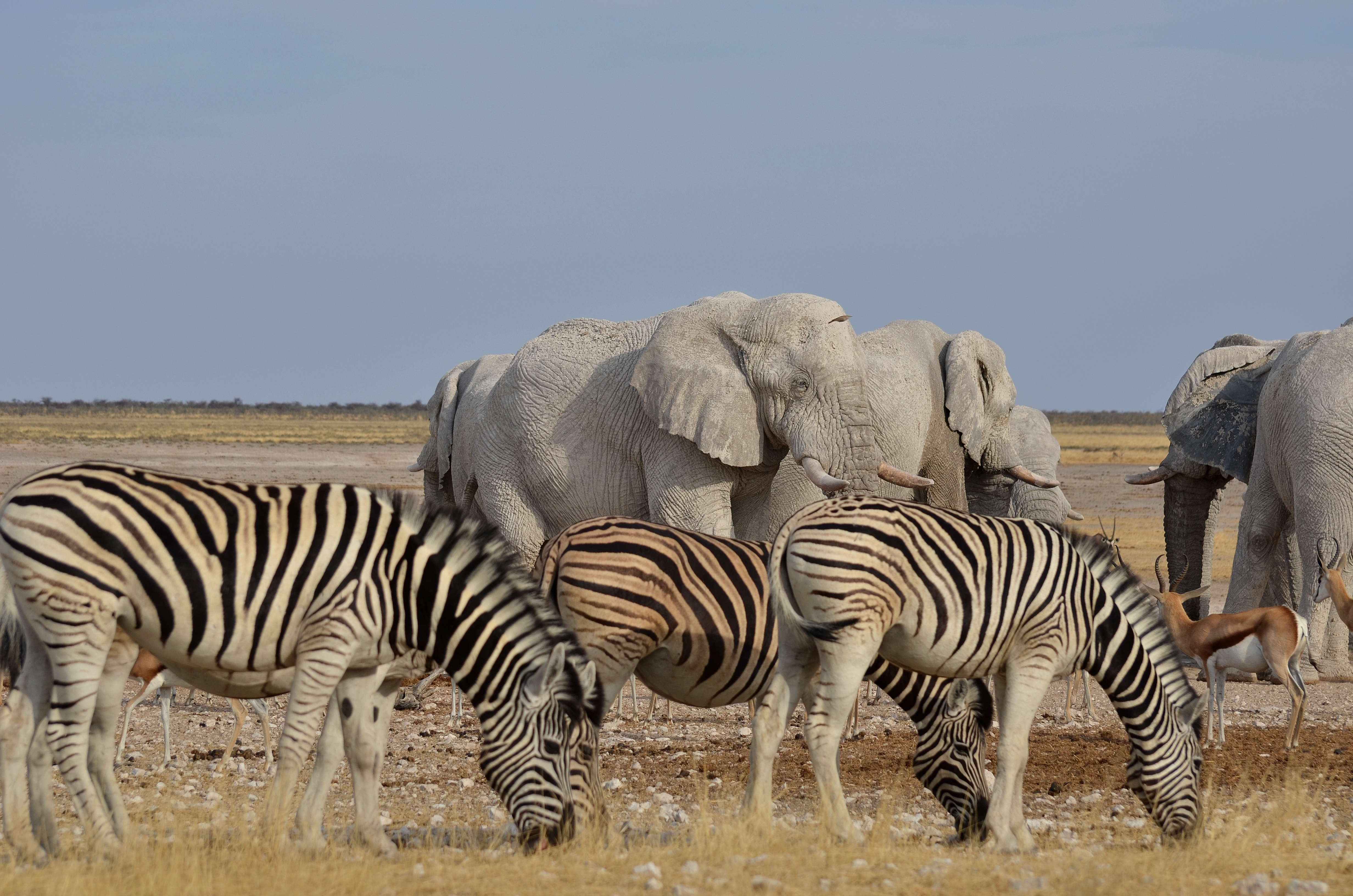 Etosha - Namibie